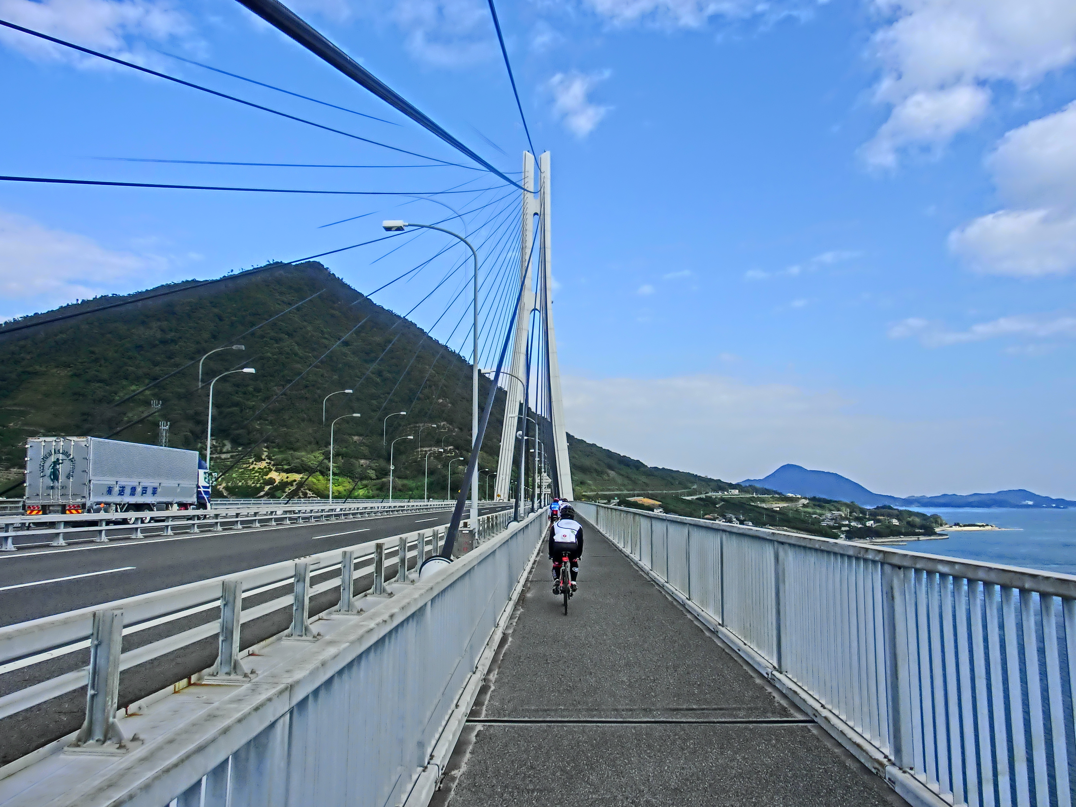 多々羅大橋の自転車・歩行者用通路。大三島から生口島を望む。